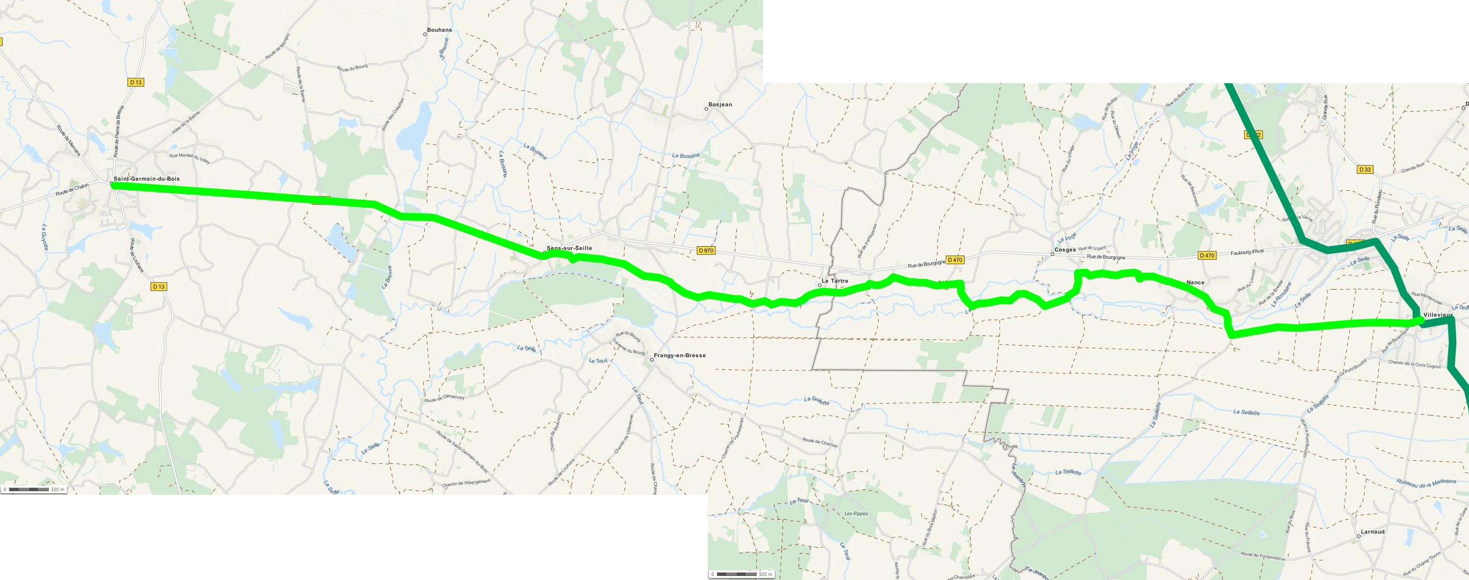 Karte der Römerstrasse von (Lons-le-Saunier) Villevieux nach L’Étalet Carte de la voie romaine de (Lons-le-Saunier) Villevieux à L’Étalet This map may be incomplete, and may contain errors. Don't rely solely on it for navigation.